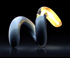 modoのロゴです。